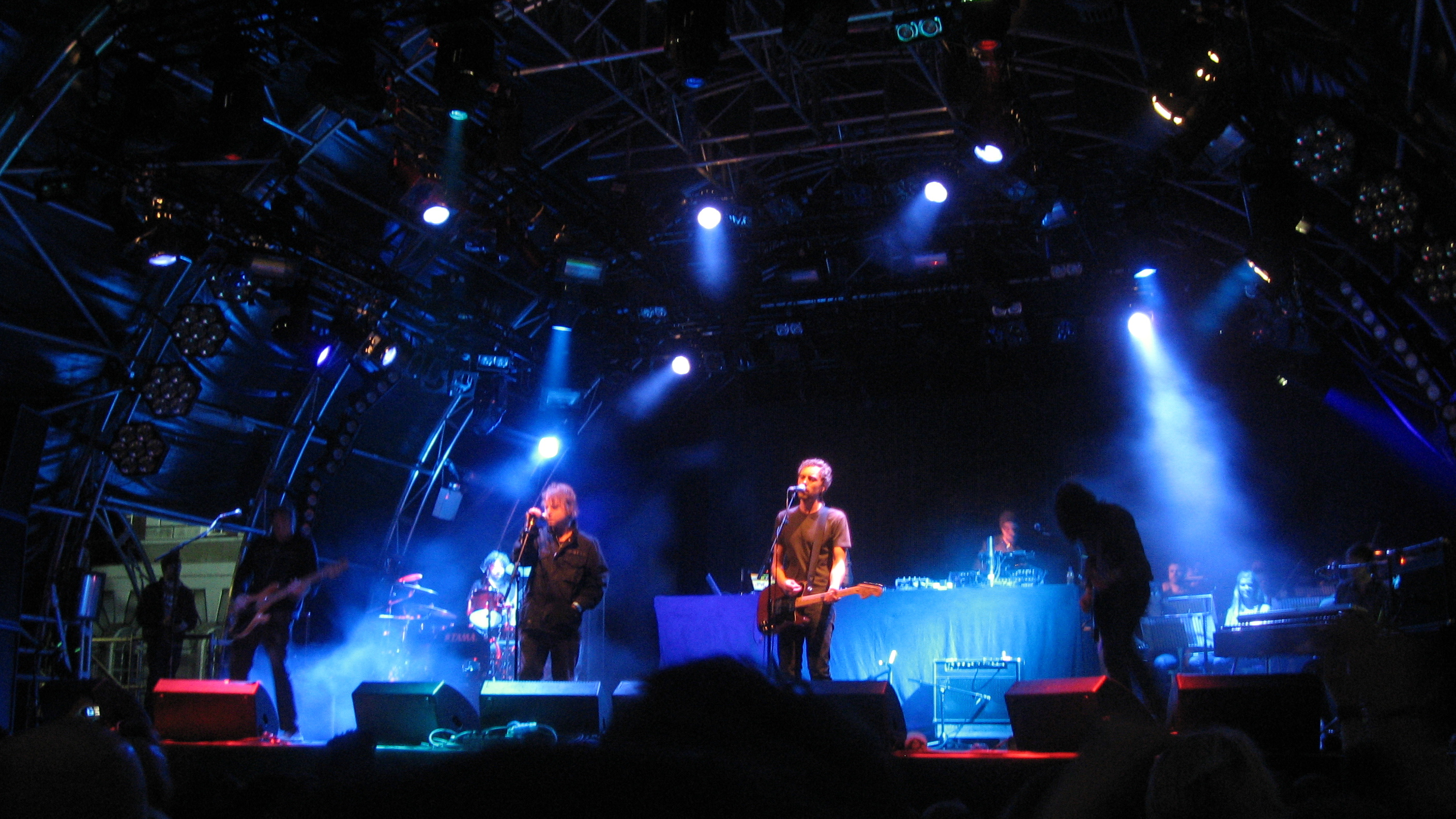 UNKLE